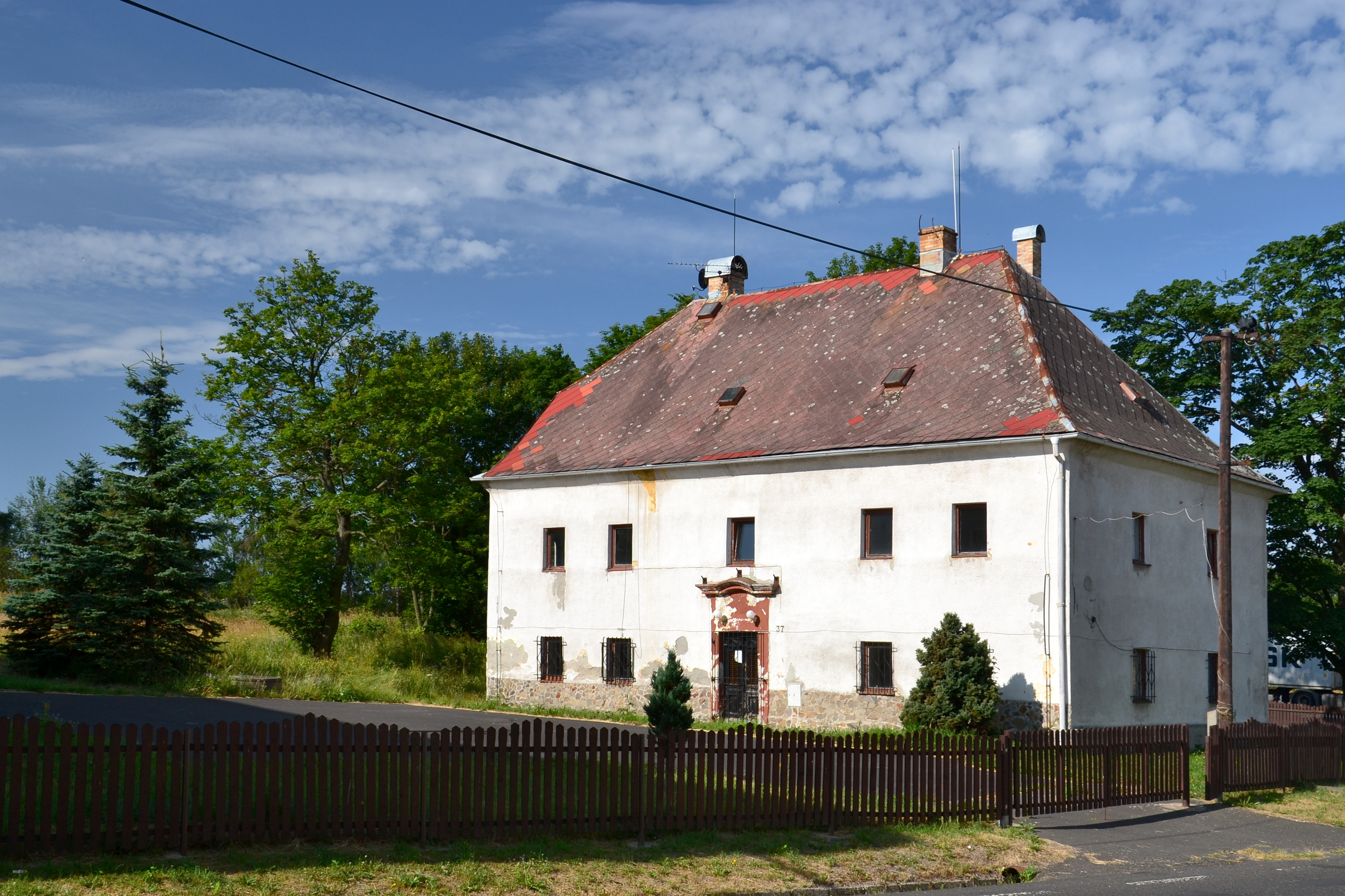 Fara (Křimov), Křimov 37